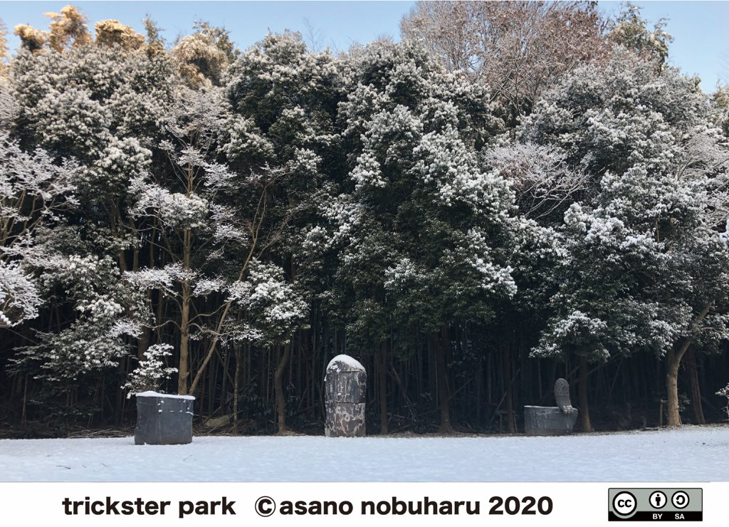 トリックスター公園（奥谷公園）での作品の様子